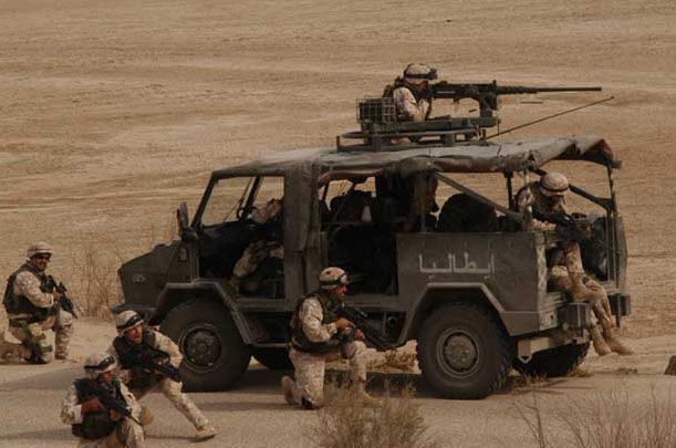 VM90 e Soldati Italiani in azione in Iraq. Foto proveniente dal sito Sito Ufficiale dell'Esercito Italiano, Autorizzazione.